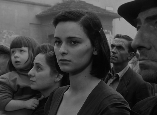 Screenshot del film Gli sbandati (1955) di Francesco Maselli.